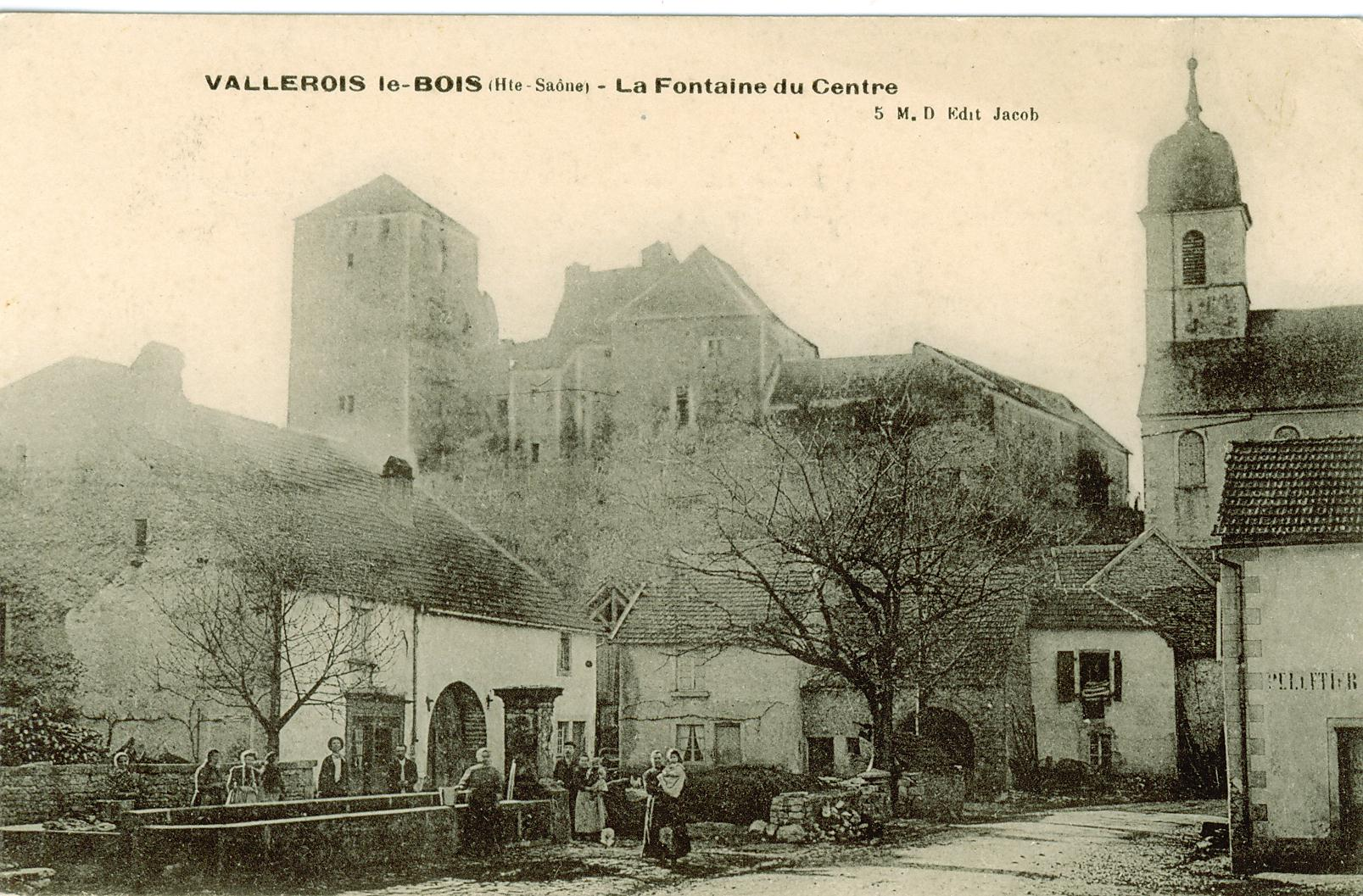 Vallerois-le-Bois (Haute-Saône ) vue du village (église et chateau )